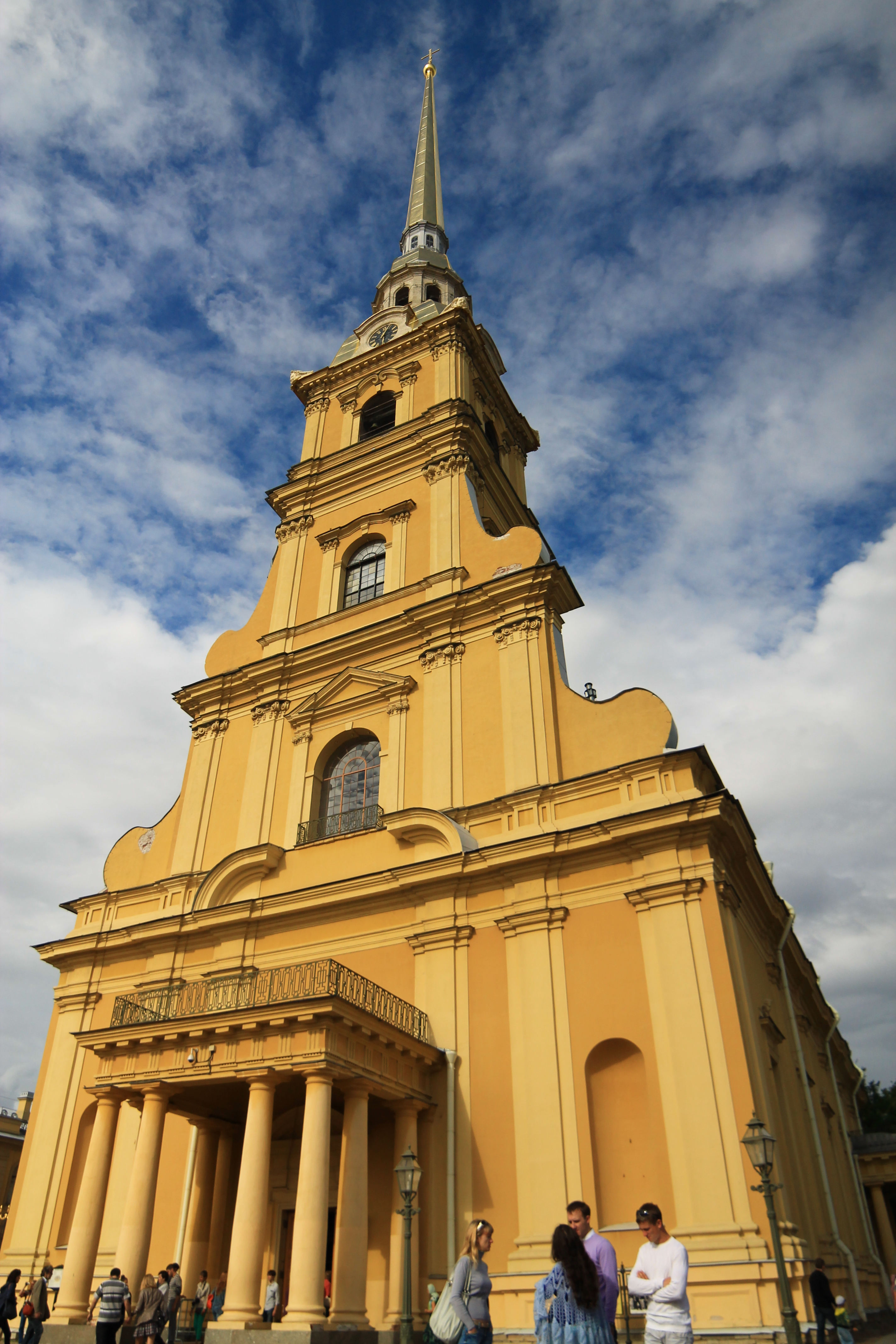 Catedral de San Pedro y San Pablo